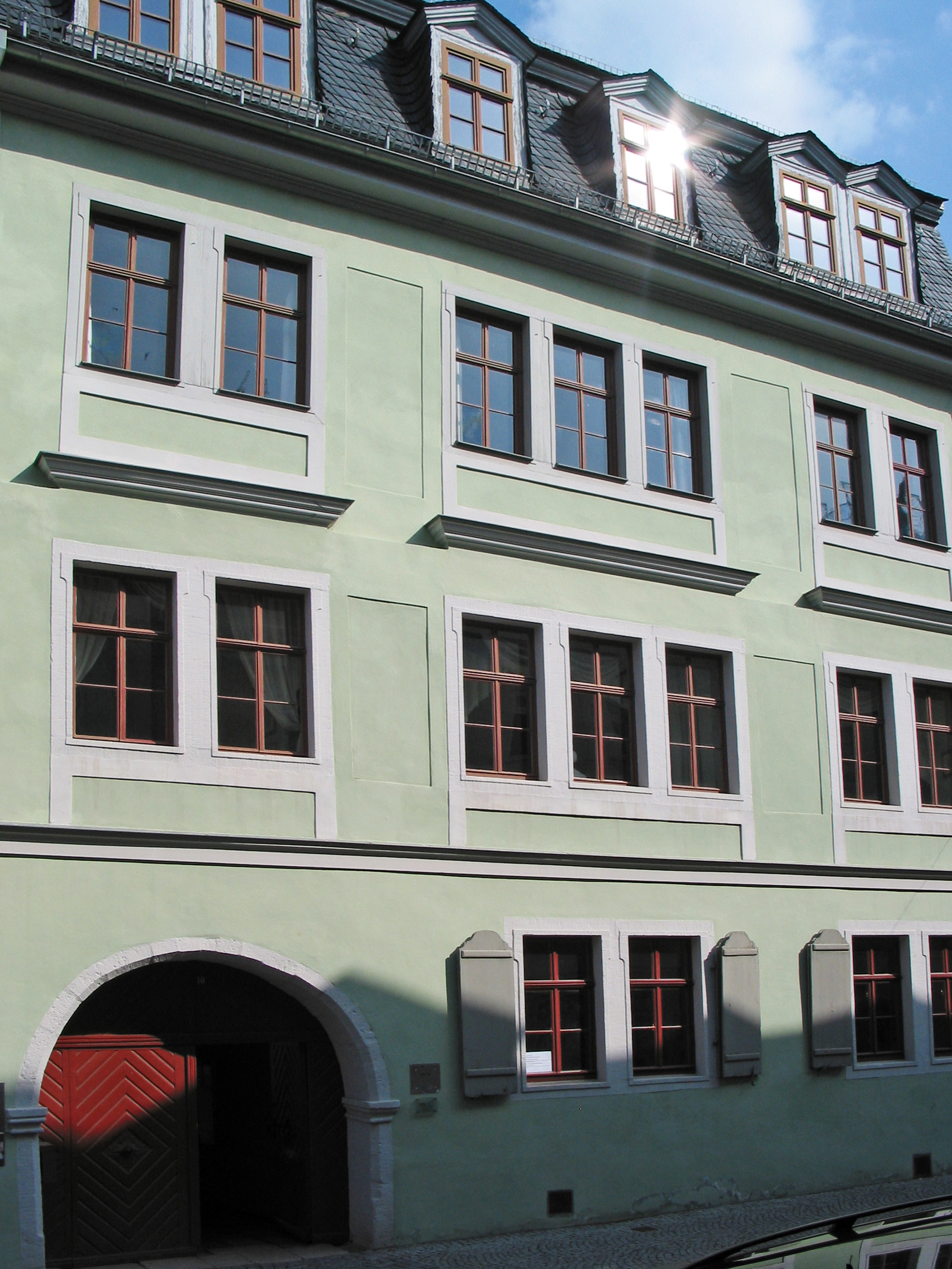 Straßenansicht des Kirms-Krackow-Hauses in Weimar, eines der ältesten erhaltenen Bürgerhäuser der Stadt. Es ist Zeugnis der damaligen bürgerlichen Wohnkultur und gilt als Architekturdenkmal. 1701 kam das Anwesen in den Besitz der Familie Kirms. Heute ist es als Museum öffentlich zugänglich.